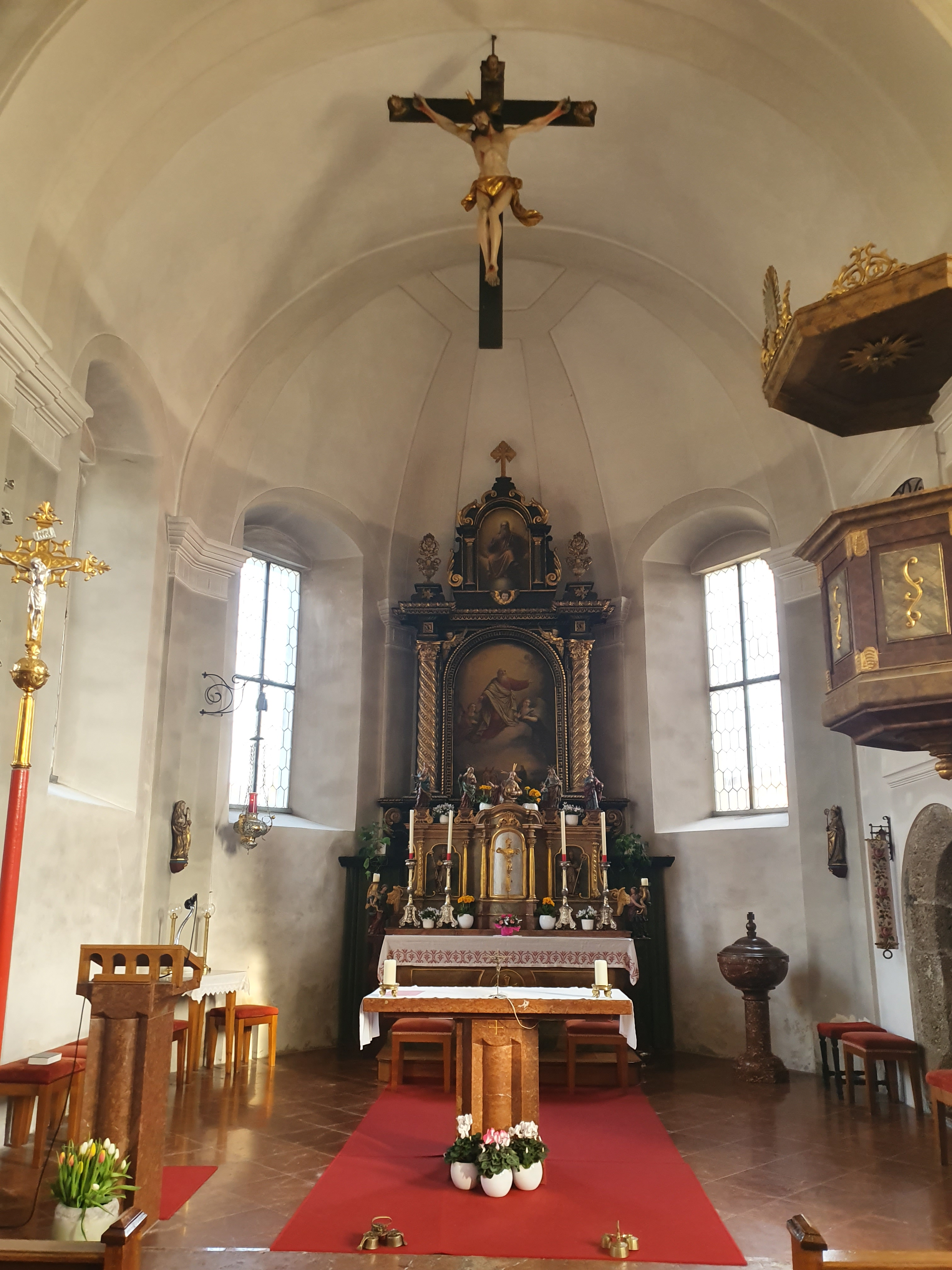 Altarretabel 1625 vom Nonnberg, Altarblilder Josef Rattensperger 1850